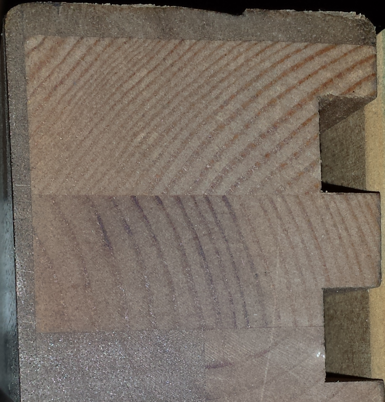 Ościeżnica drewniana drzwiowa